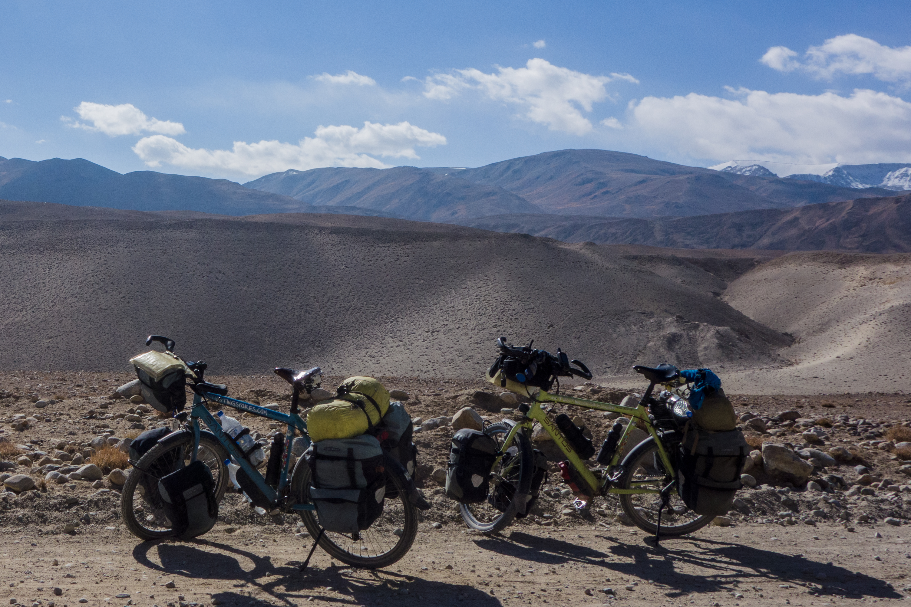 I tajikistan